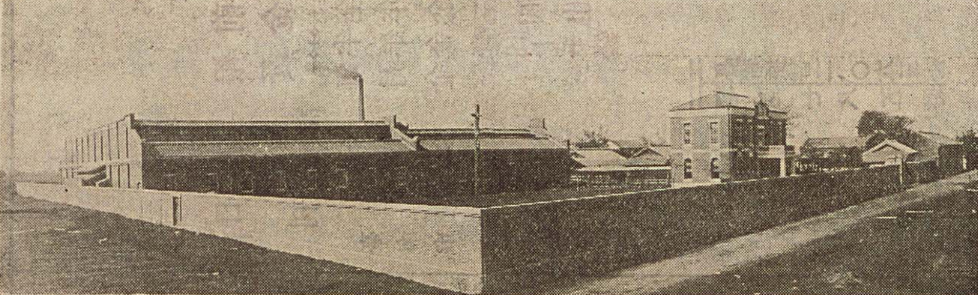 中文（台灣）: 台灣織布會社，位於現今台南市南區，已拆除